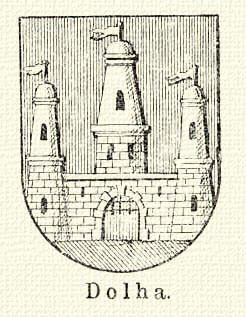 Герб села Довге 1880 року